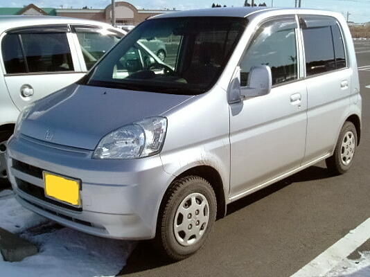 3代目ホンダ・ライフ（後期型）